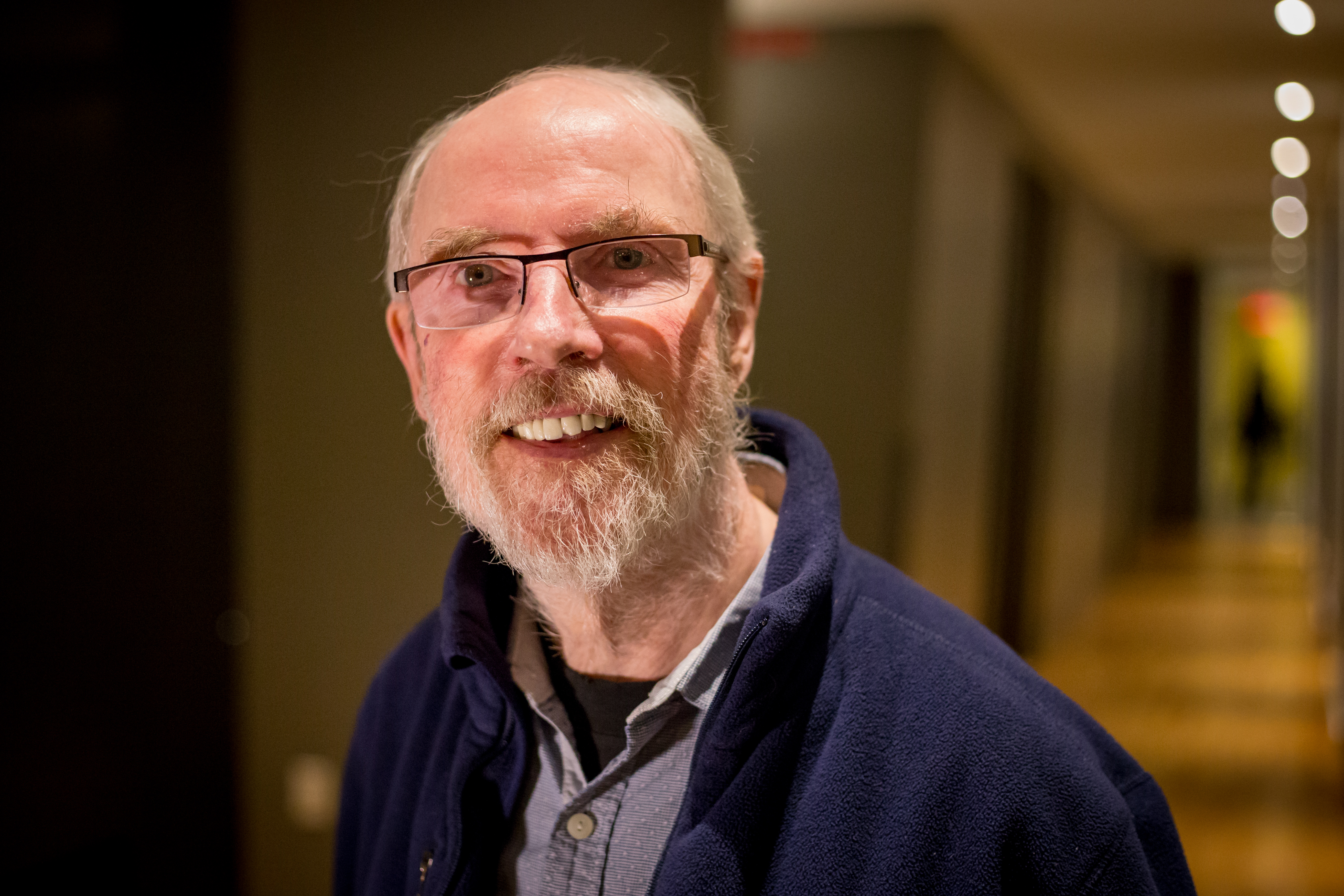 Portrait du cinéaste Co Hoedeman réalisé lors d'un atelier Wikipédia ayant eu lieu à la Cinémathèque québécoise.